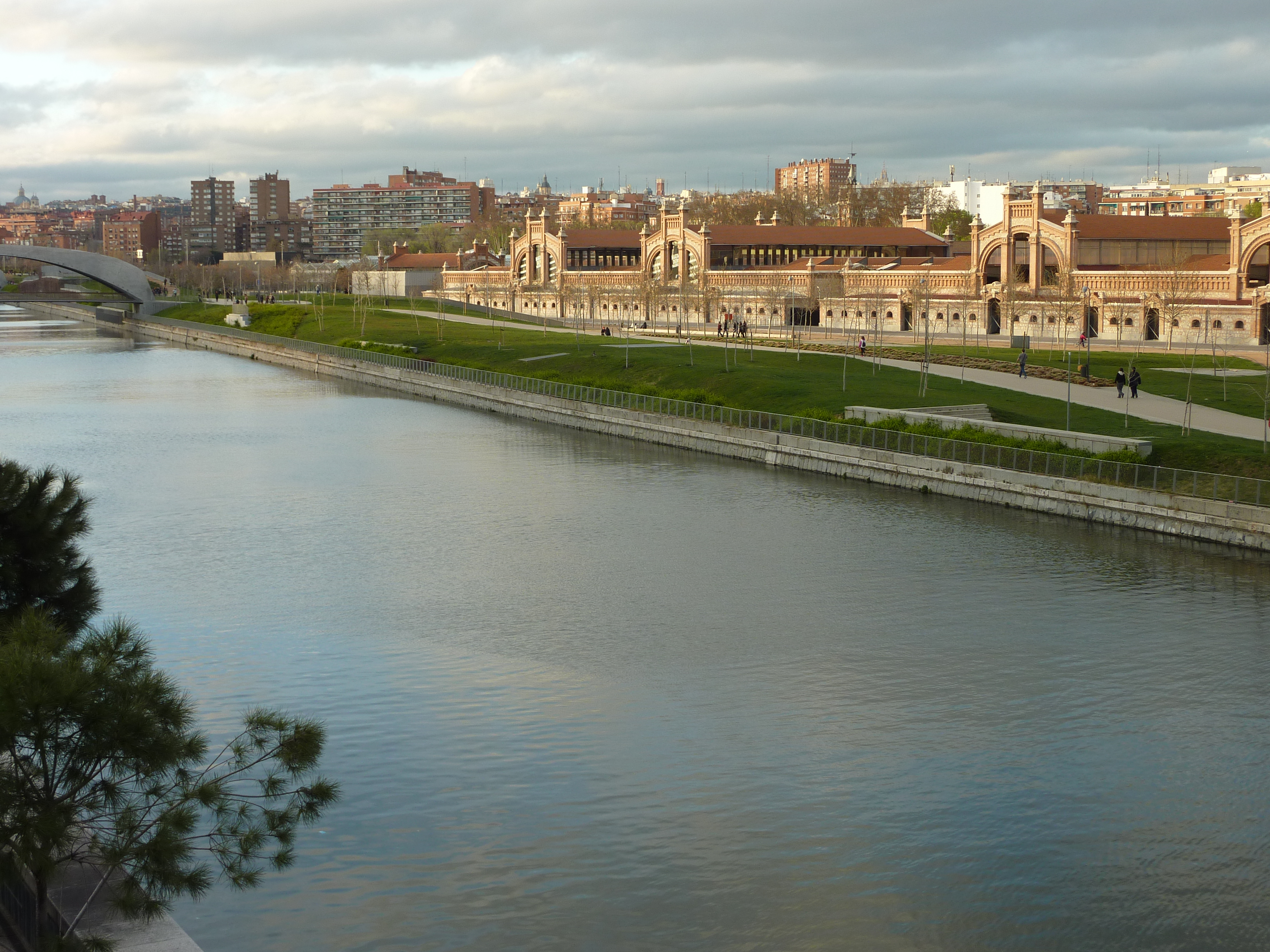 Rio Manzanares